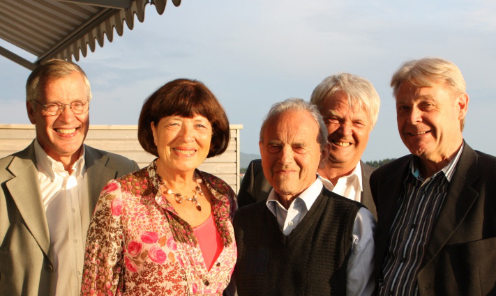 Ledergruppen for Samordnet musikkforsøk 1974–1981. Fra v.: Harry Rishaug (prosjektleder), Liv Utler Henriksen, Kåre Opdal, Oddvin Vatlestad og Vidar Hjemås